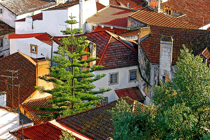 On Explore #417 - 14.01.2008 Telhados de Torres Vedras / Torres Vedras Roof's